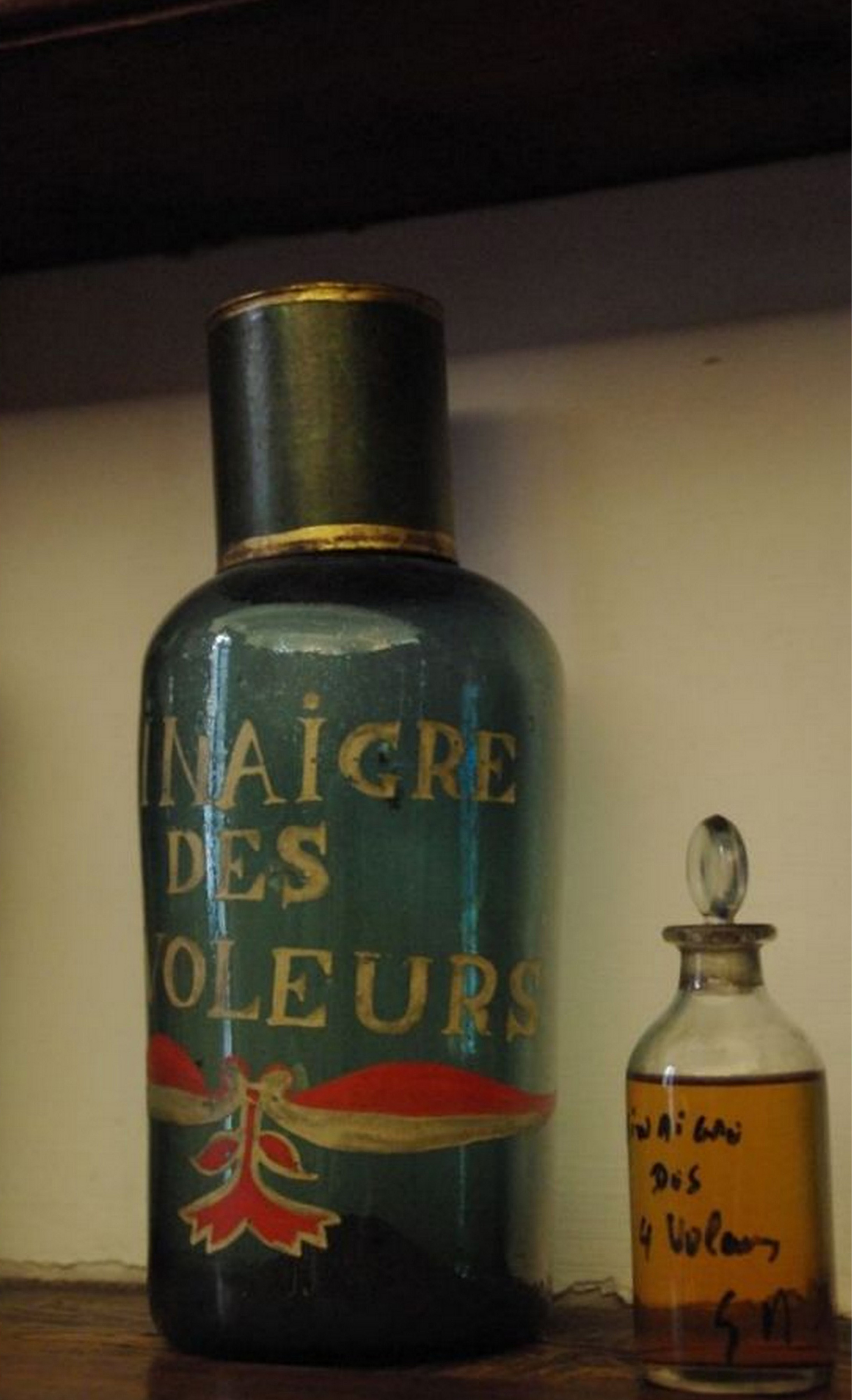 Vinaigre des 4 Voleurs dans la pharmacie de l'Hôtel-Dieu de Saint-Lizier (Ariège, France).